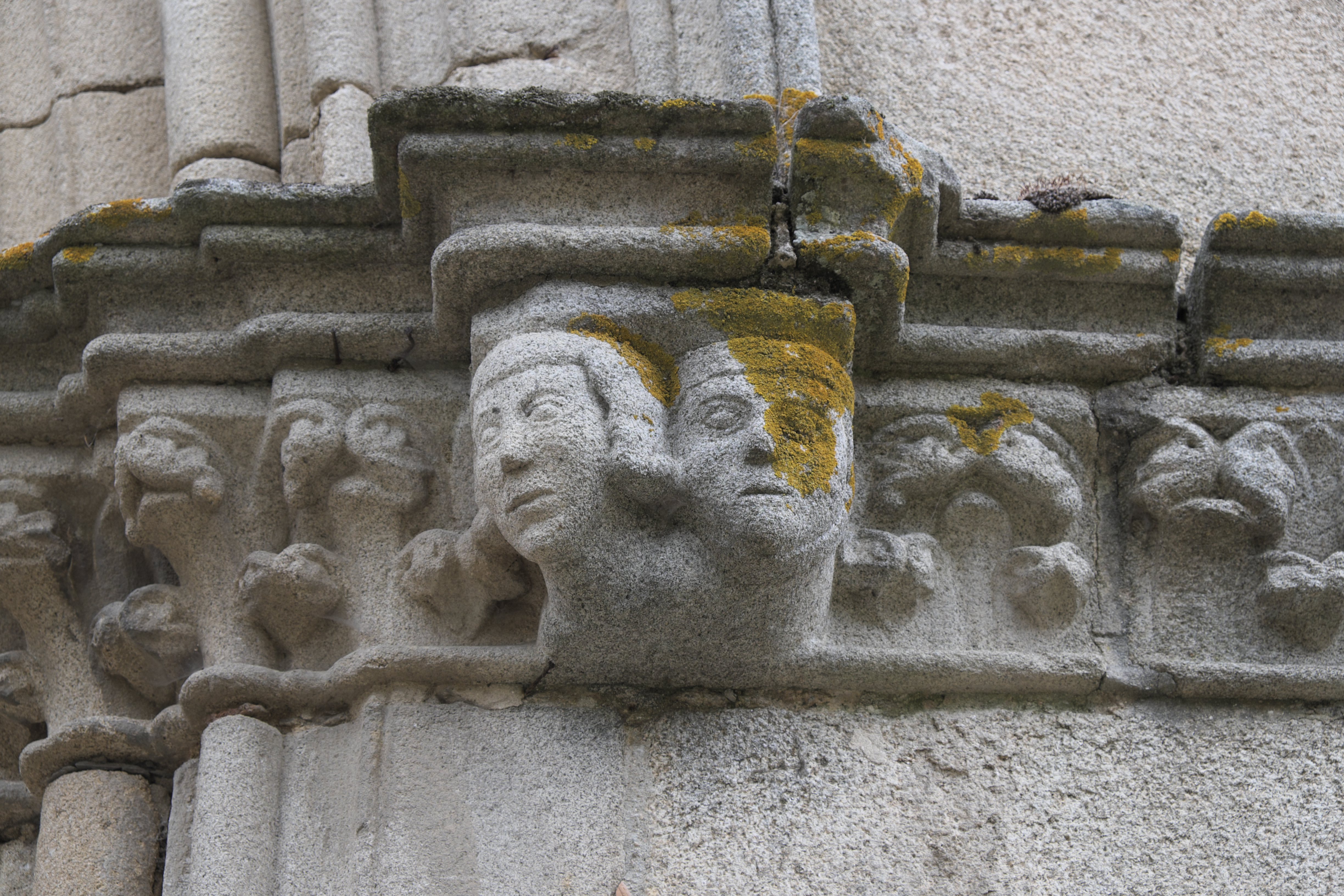 Stiftskirche Saint-Étienne in Eymoutiers im Département Haute-Vienne (Nouvelle-Aquitaine/Frankreich), Konsolen an der Fassade